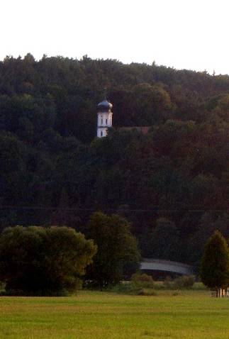 Wallfahrtskirche Heilbruennl in Roding vom Regental aus gesehen